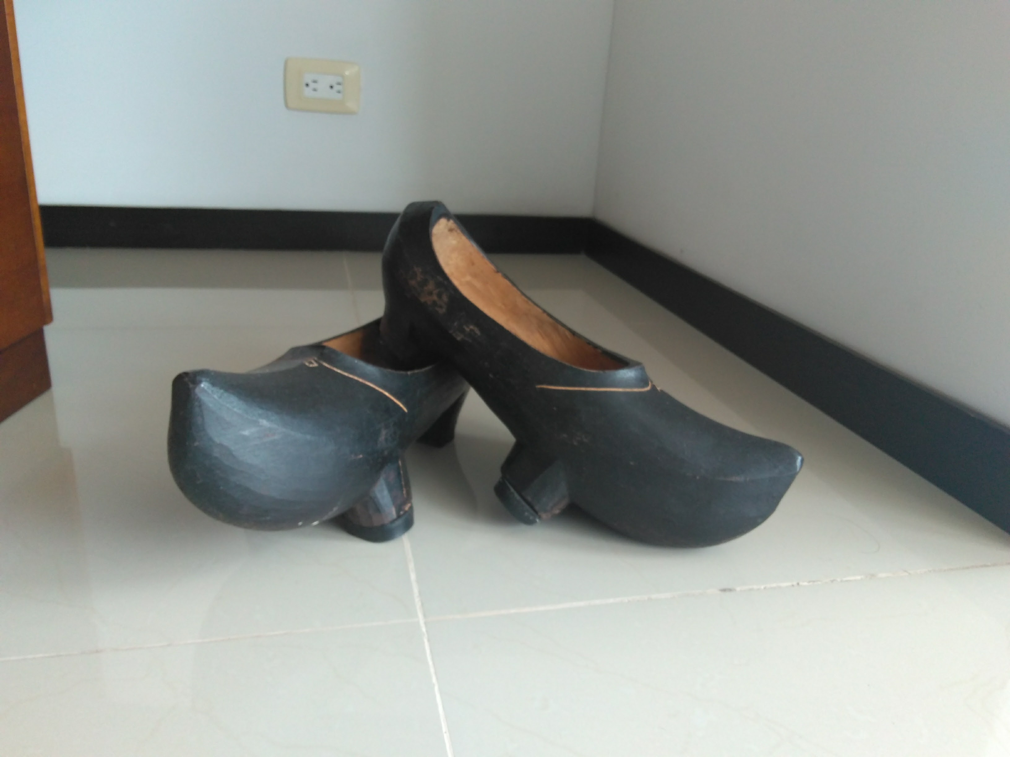 Calzado típico asturiano: les madreñes